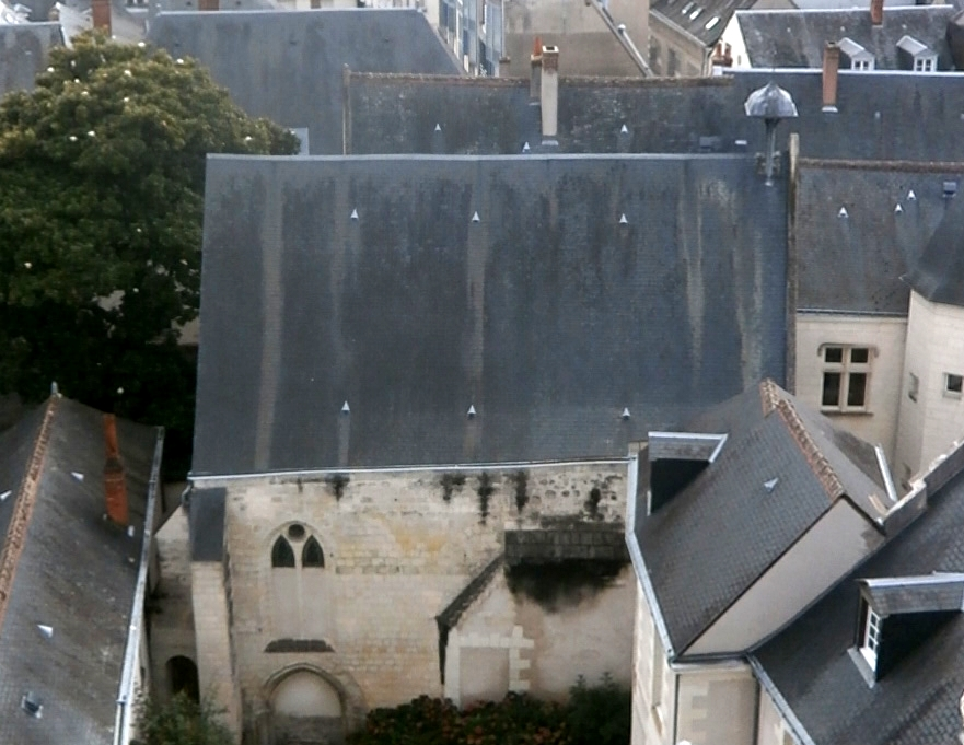 Vue générale de la chapelle